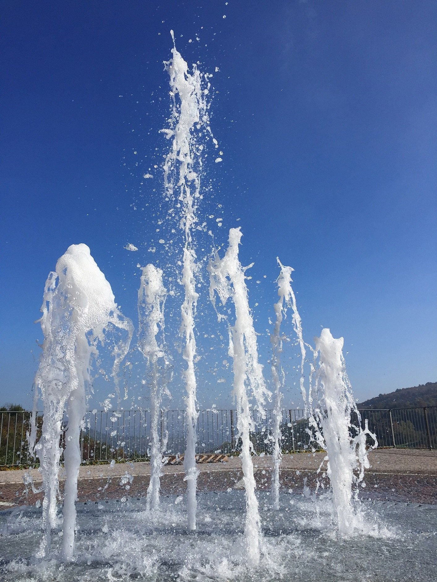 Der neue Springbrunnen am Marktplatz von Prunetto (seit Sommer 2015)